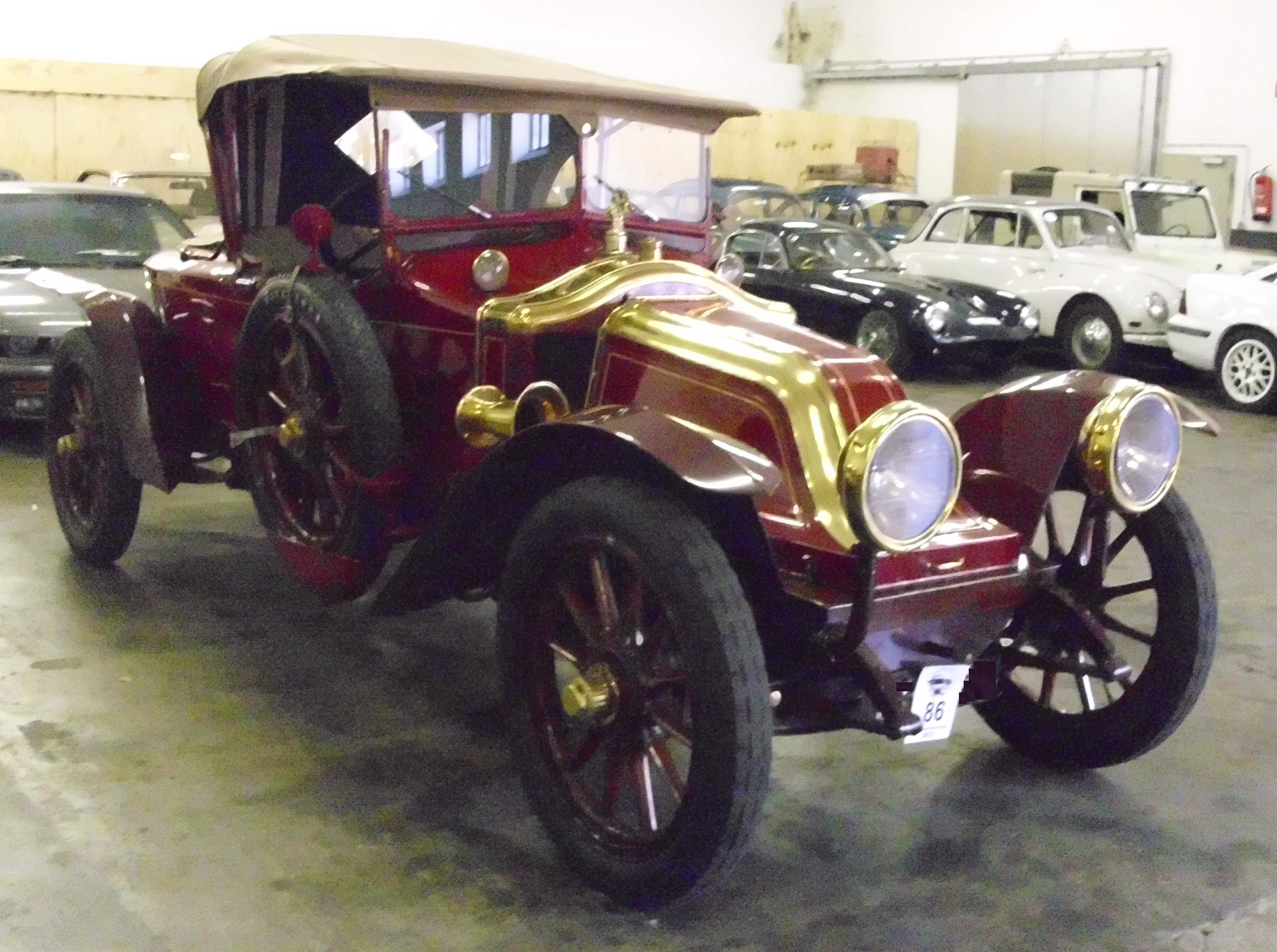 Renault Type EI Torpedo von Labourdette 1914